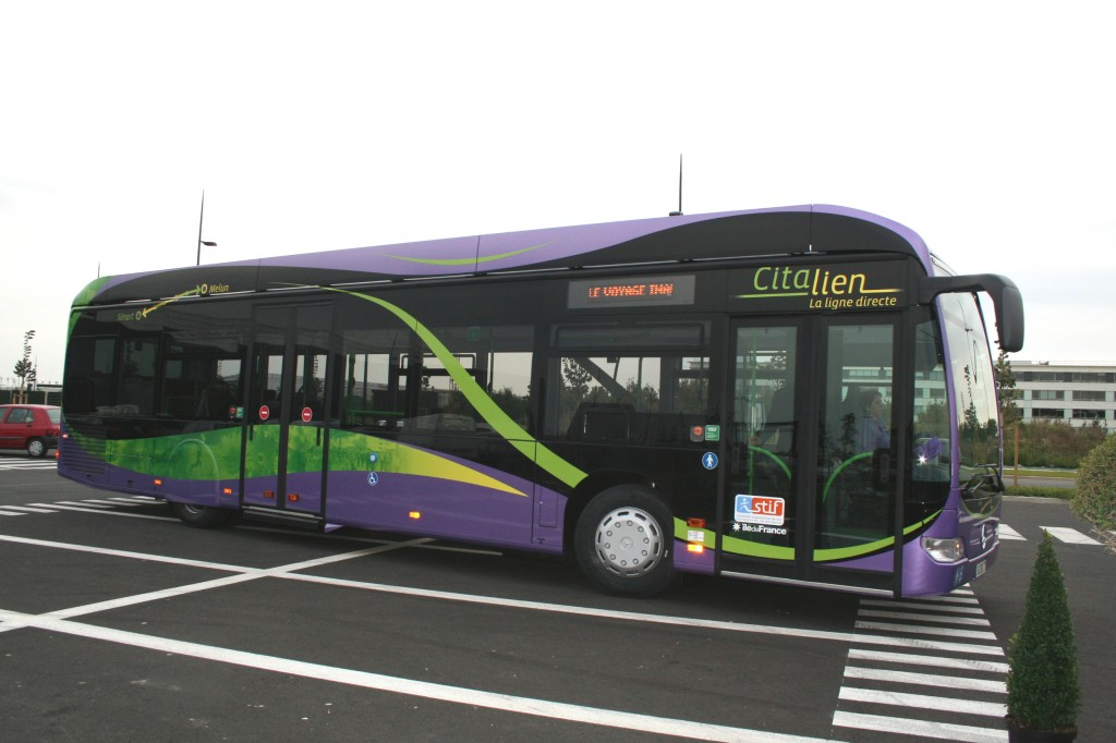 Mercedes-Benz Citaro K BHNS à Lieusaint lors de l'inauguration de la ligne Citalien